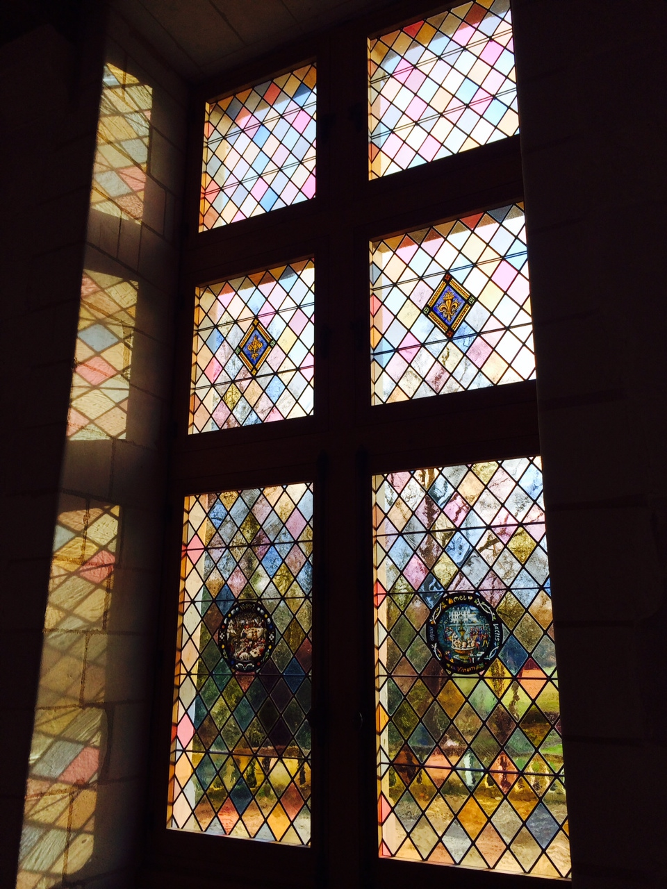 Art du vitrail XVsiècle